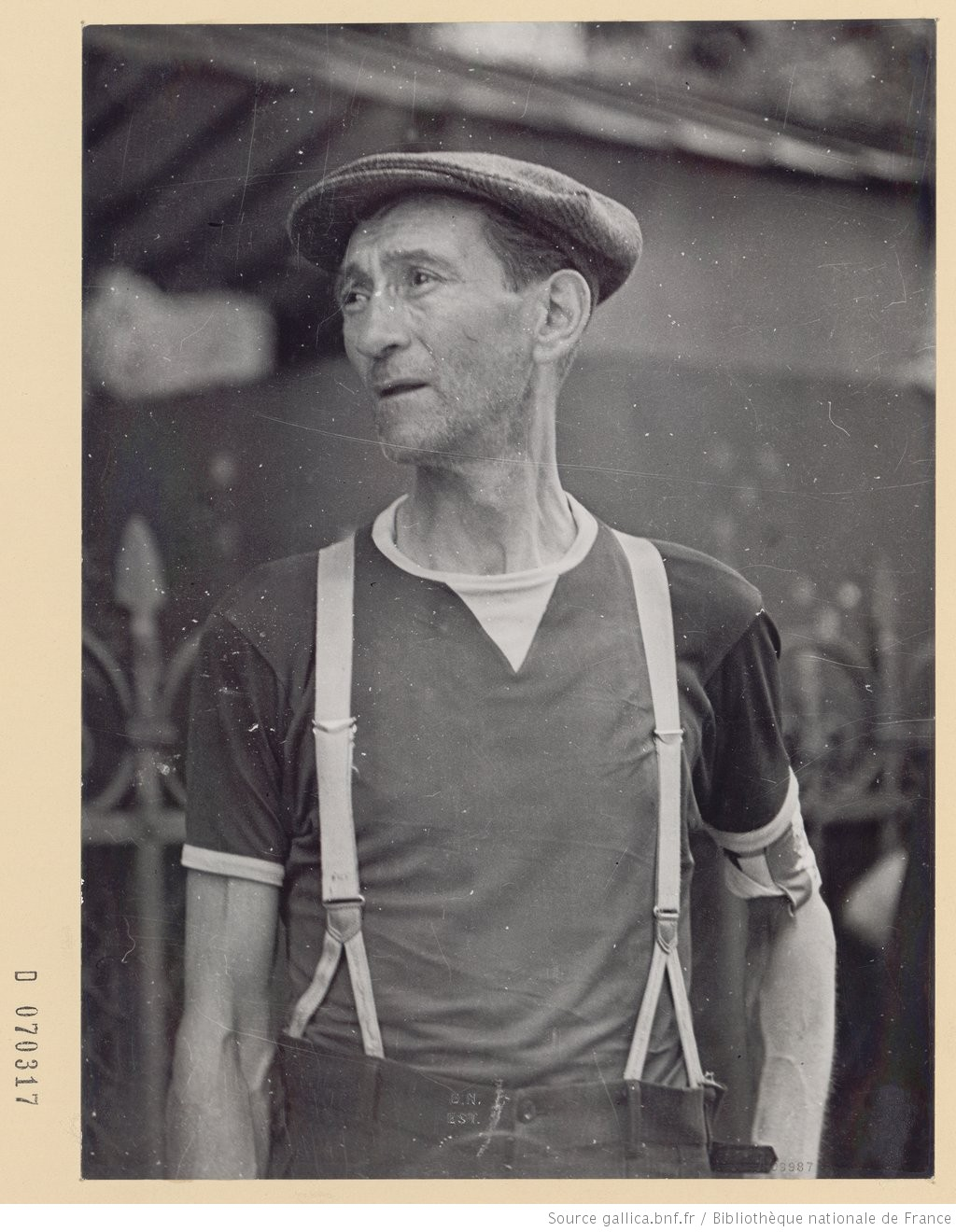 Raymond Caudrilliers dit Aimos, acteur, prise le 22 août 1944, veille de sa mort